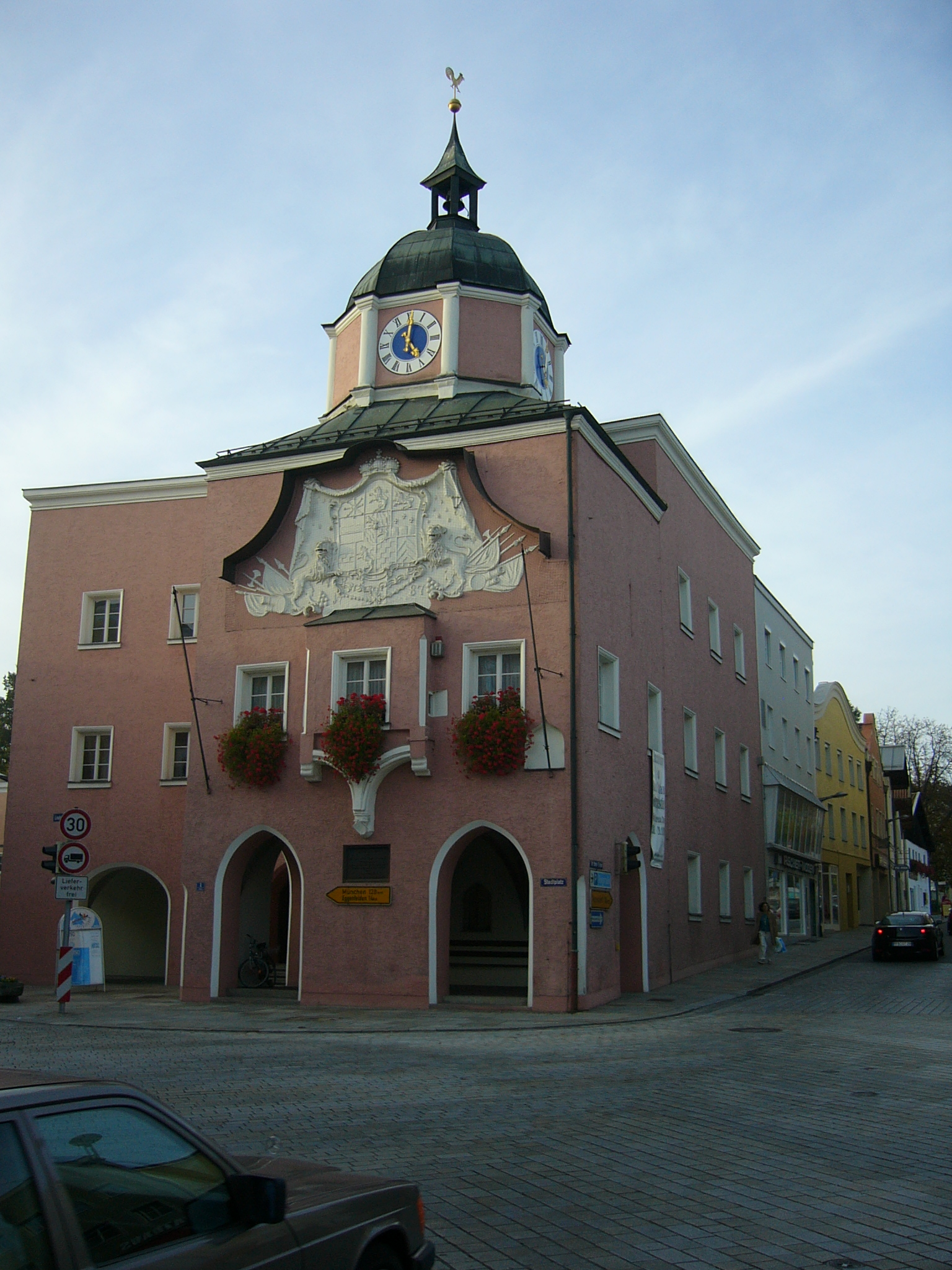 Altes Rathaus in Pfarrkirchen am Inn (Bayern), Germany (built c. 1500) mit Wappenrelief des Kurfürsten Carl Theodor von Bayern